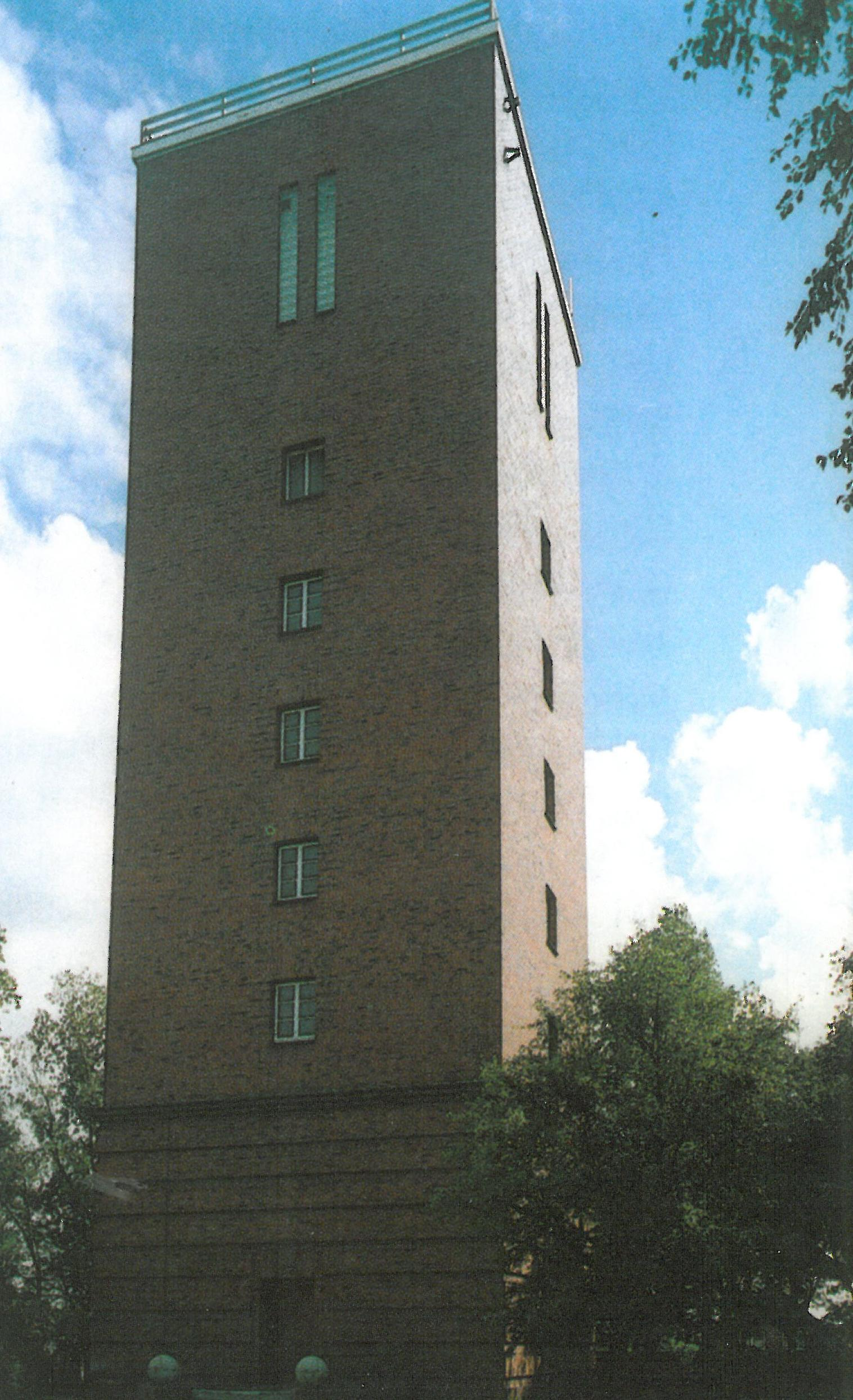 Wassertum in Norden